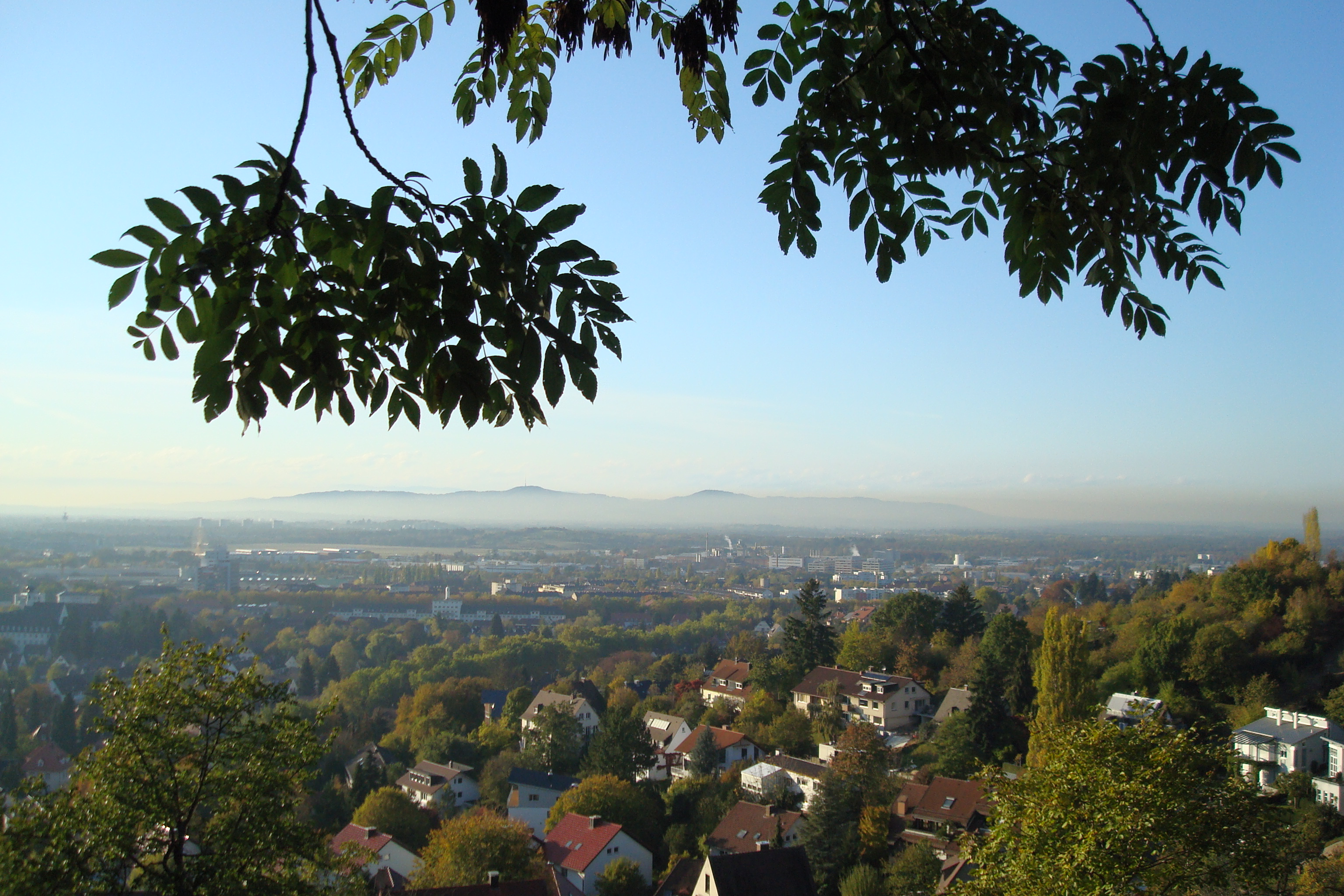 Ansicht des Kaiserstuhls in der Oberrheinebene gesehen von der Eichhalde in Freiburg im Breisgau aus.